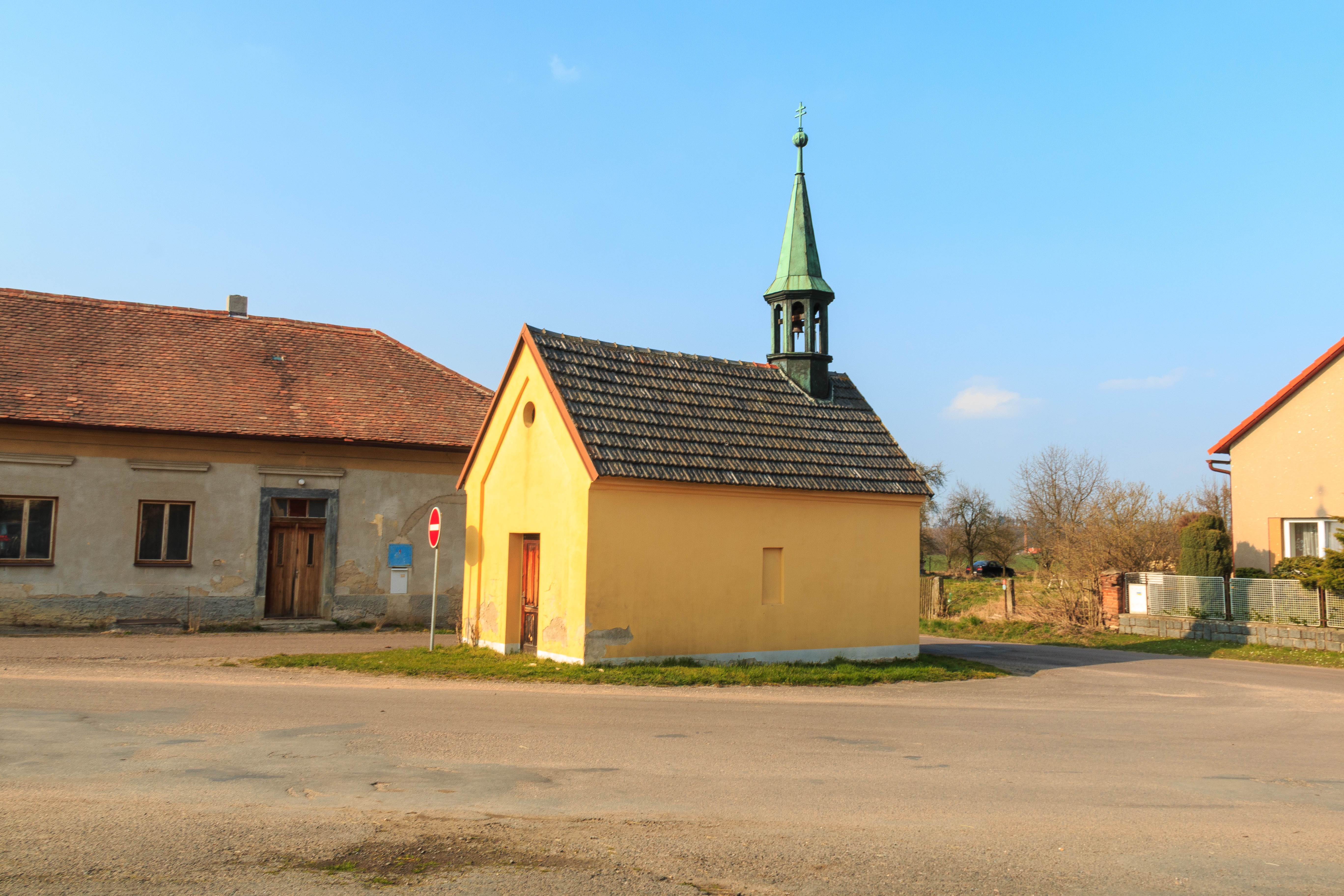 Chacholice zvonice, původně požární zbrojnice